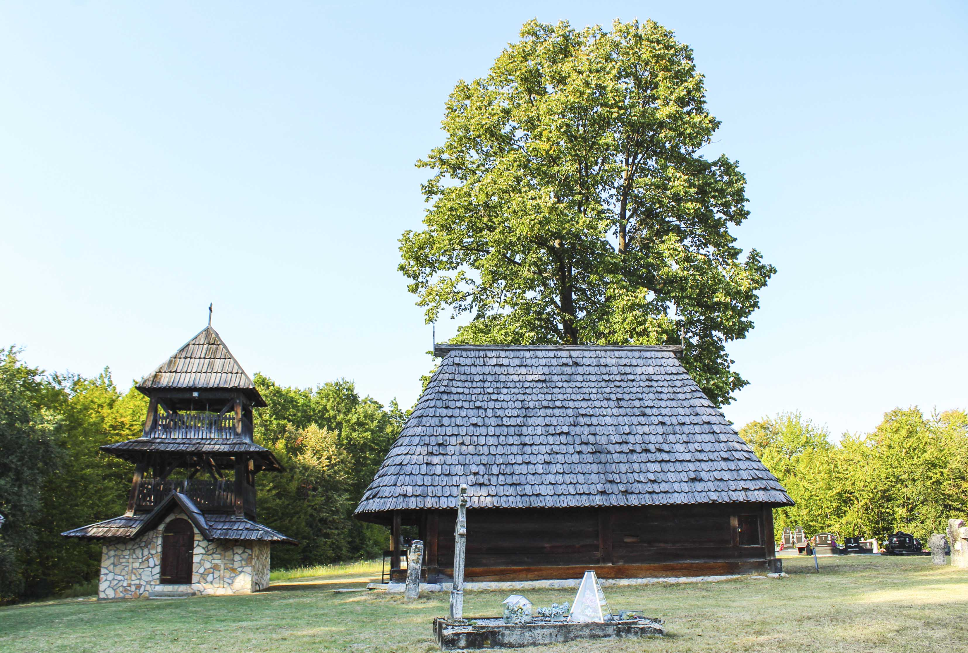 NKD370